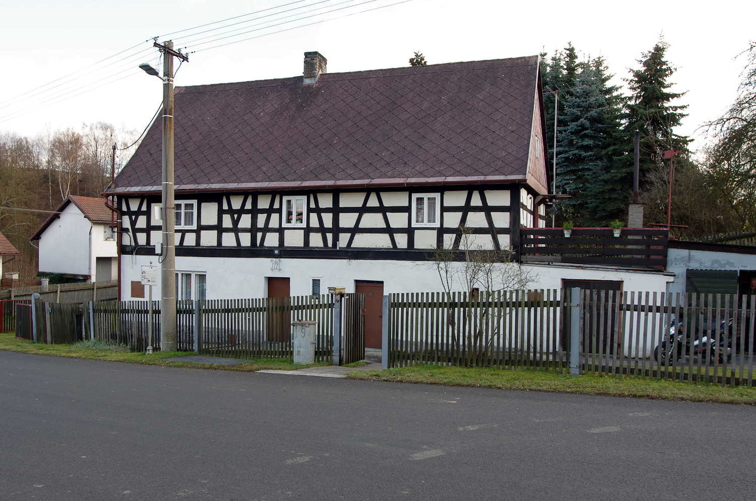 Venkovský dům (Týn), Dvořákova 19, Týn